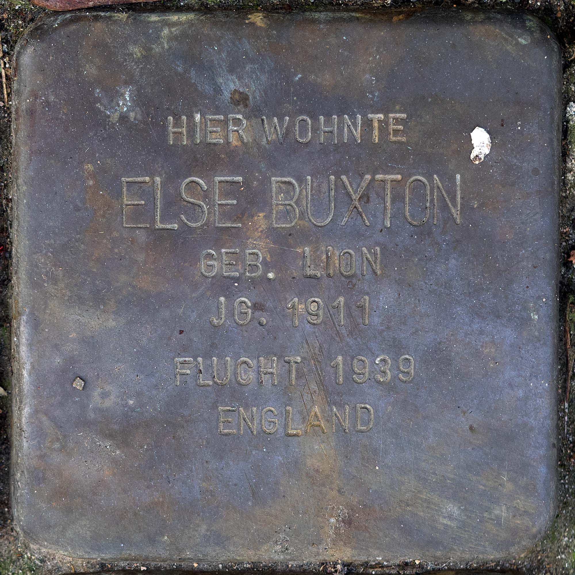 Stolperstein für Buxton Else